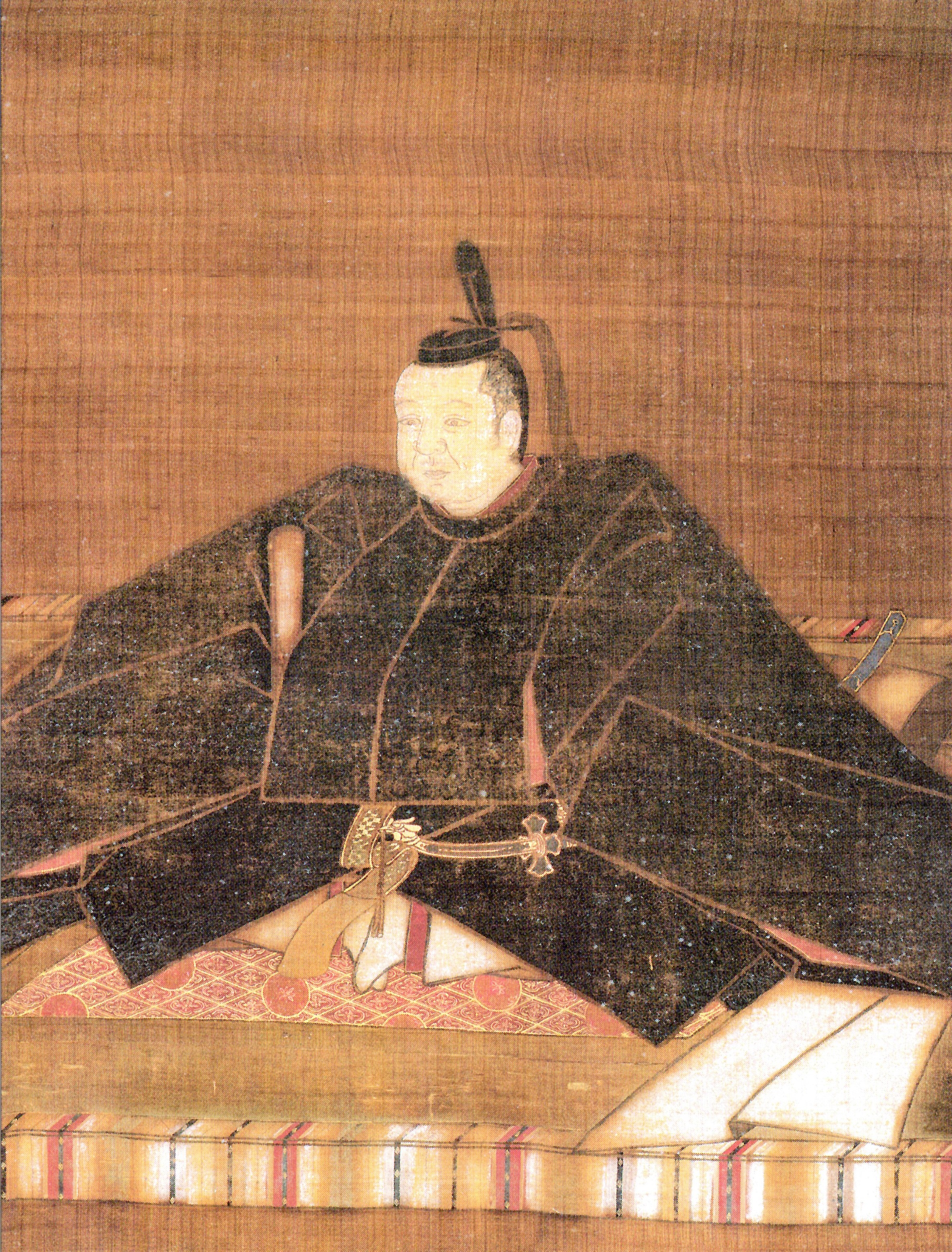 京極忠高の肖像。